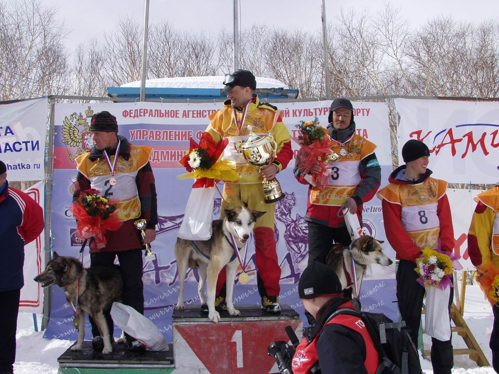 Награждение на гонке КАМЧАДАЛ -2005